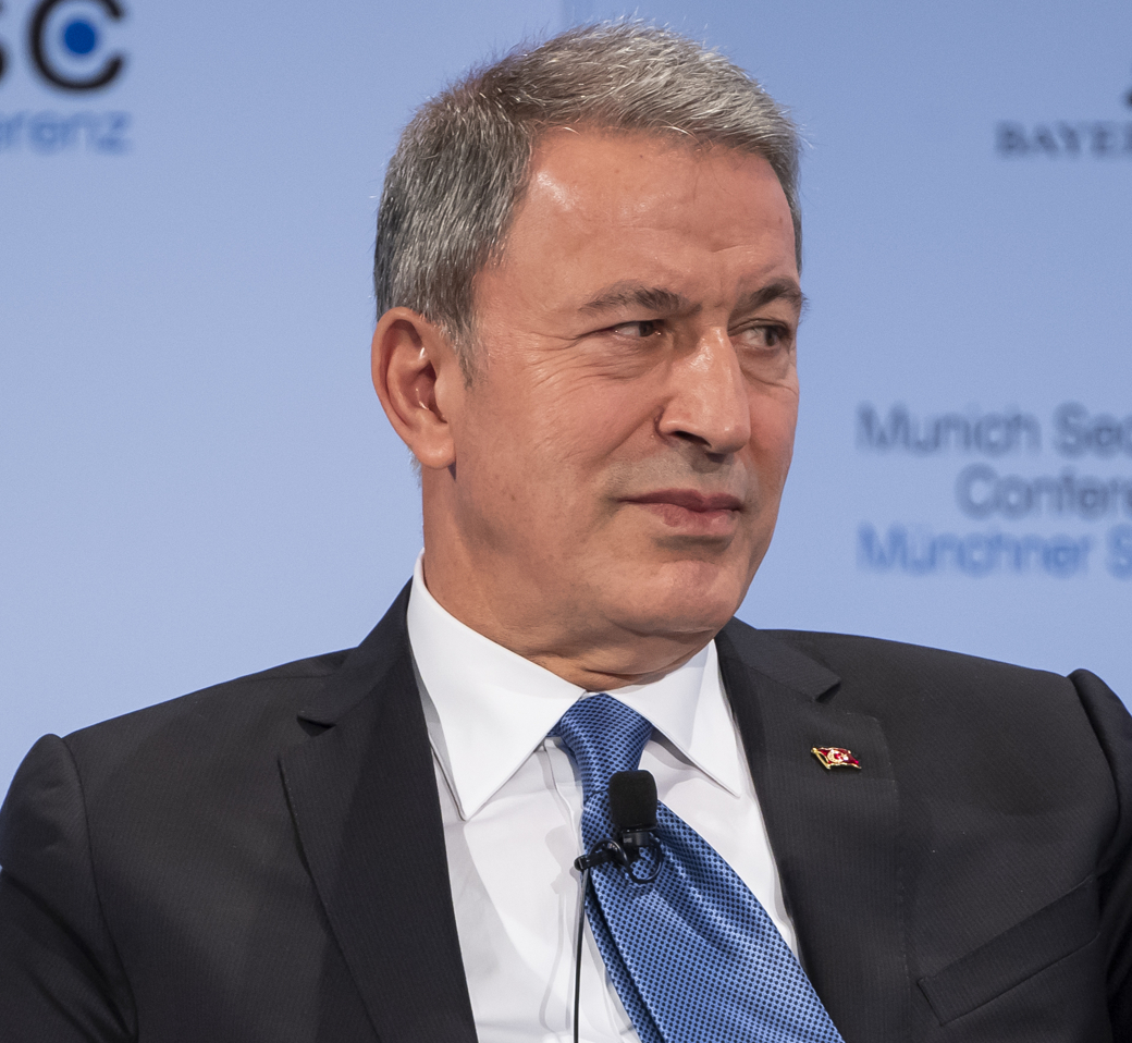 Hulusi Akar während der Münchener Sicherheitskonferenz 2019